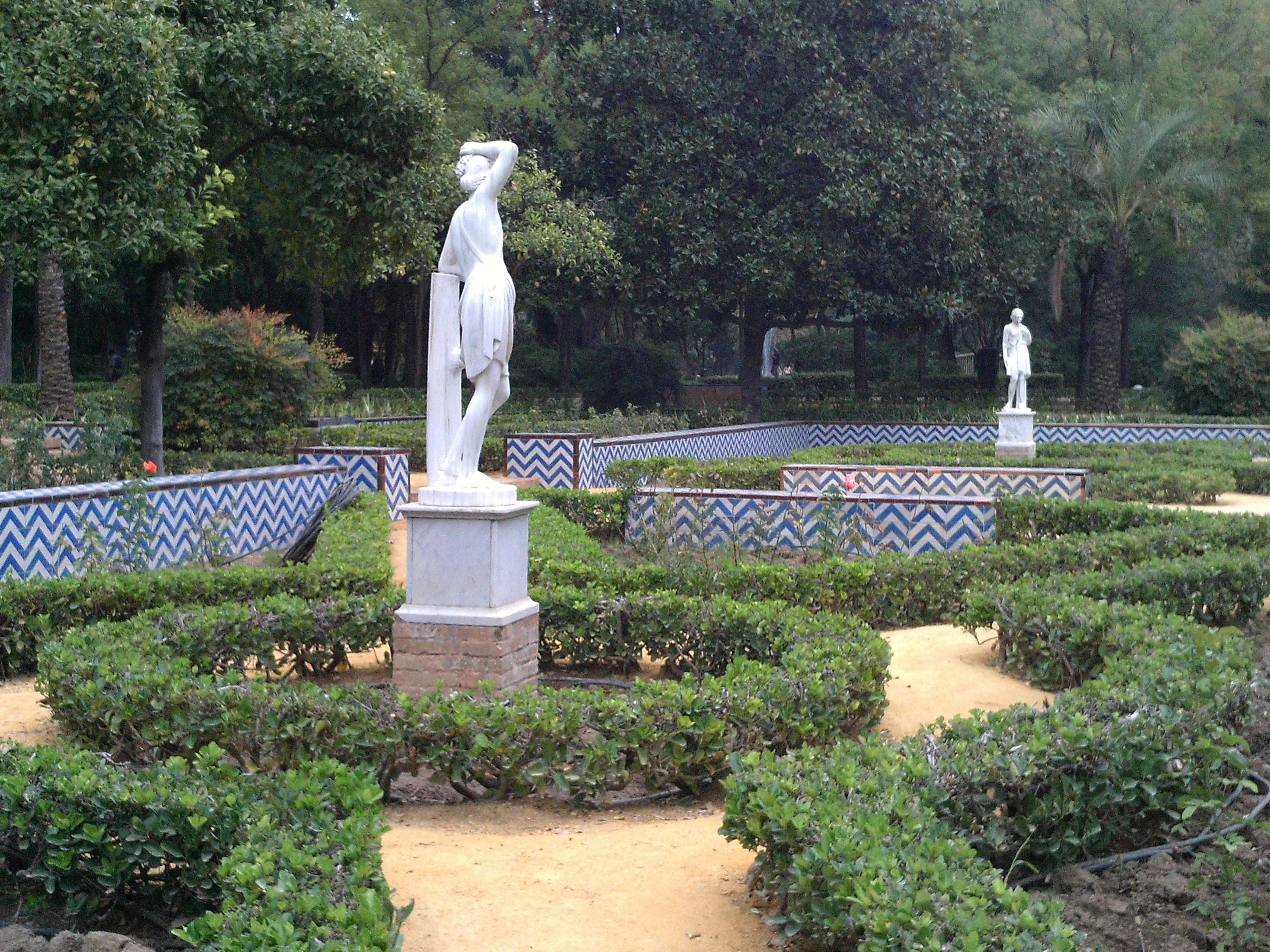 Estas del otoño y del verano entre setos. Glorieta de la Concha, parque de María Luisa, Sevilla, Andalucía, España.